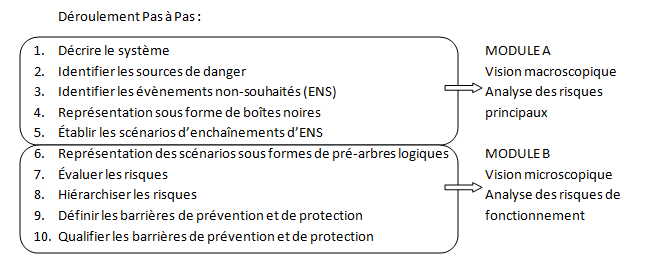 Résumé de la méthode